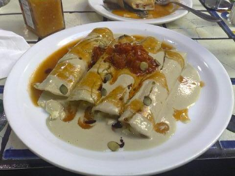 Papadzules